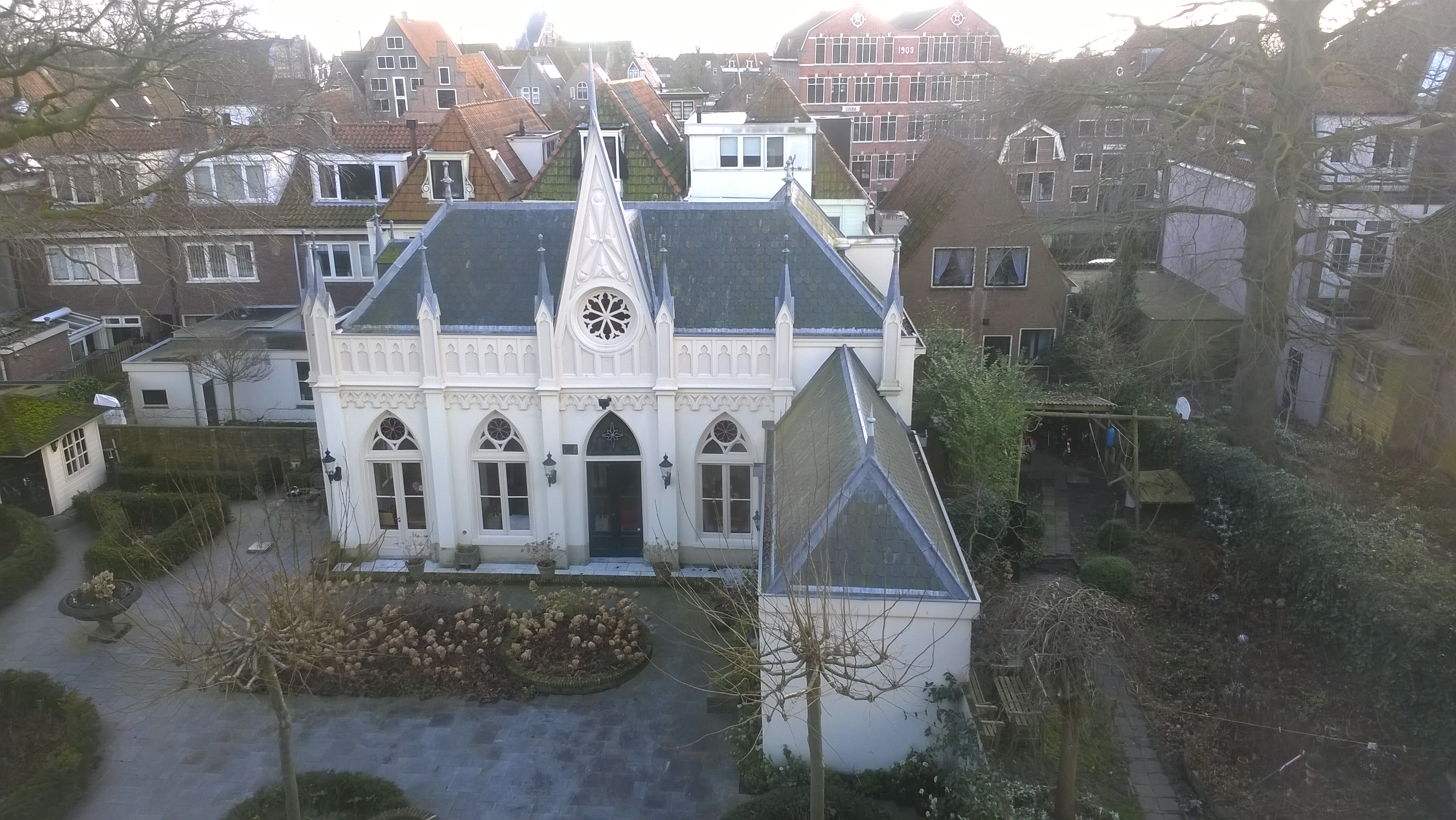 Neogotische kapel achter Grote Oost 26 in Hoorn.